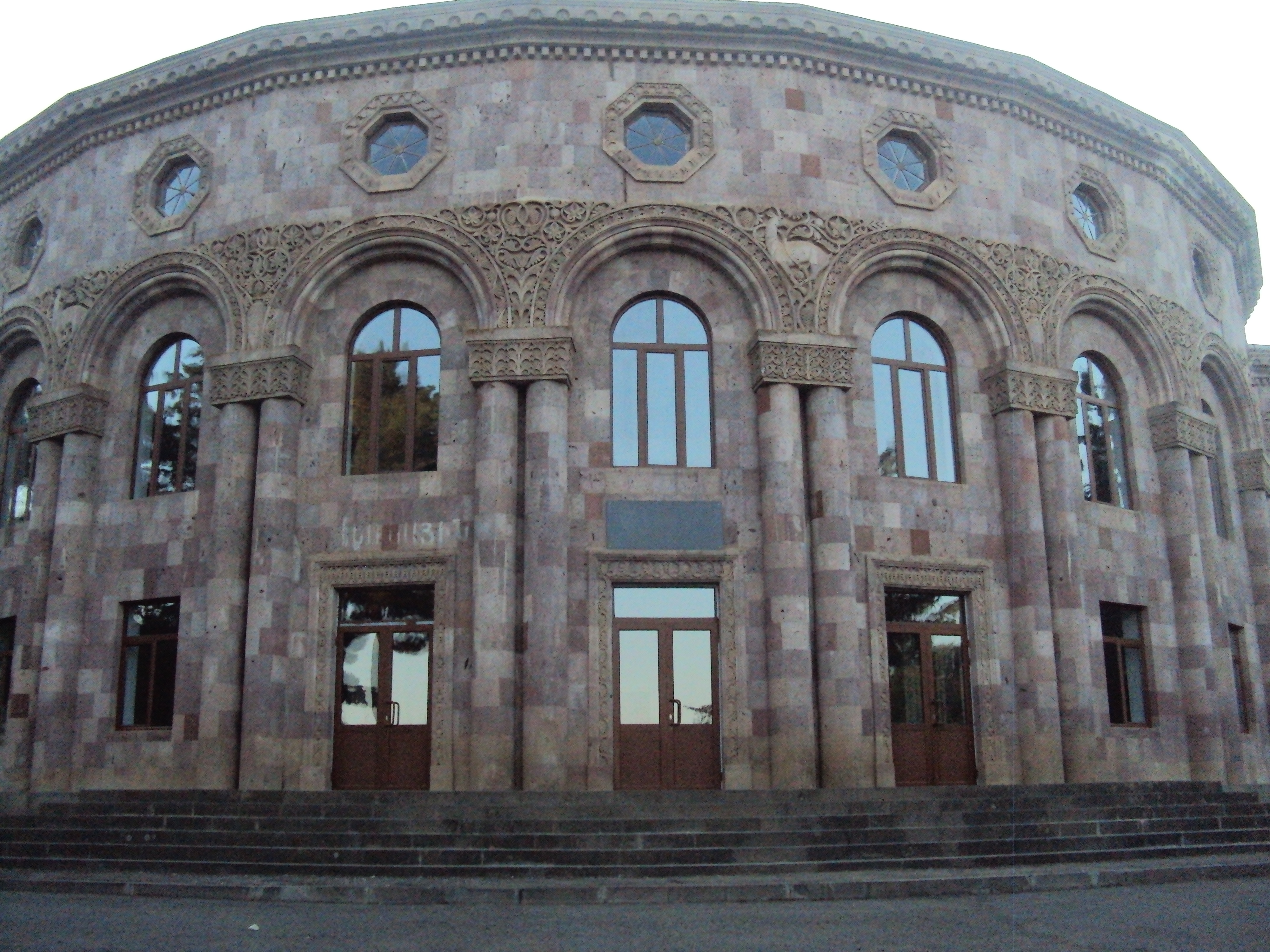 Սևակ Ղուկասյանի անվան մարզամշակութային պալատ